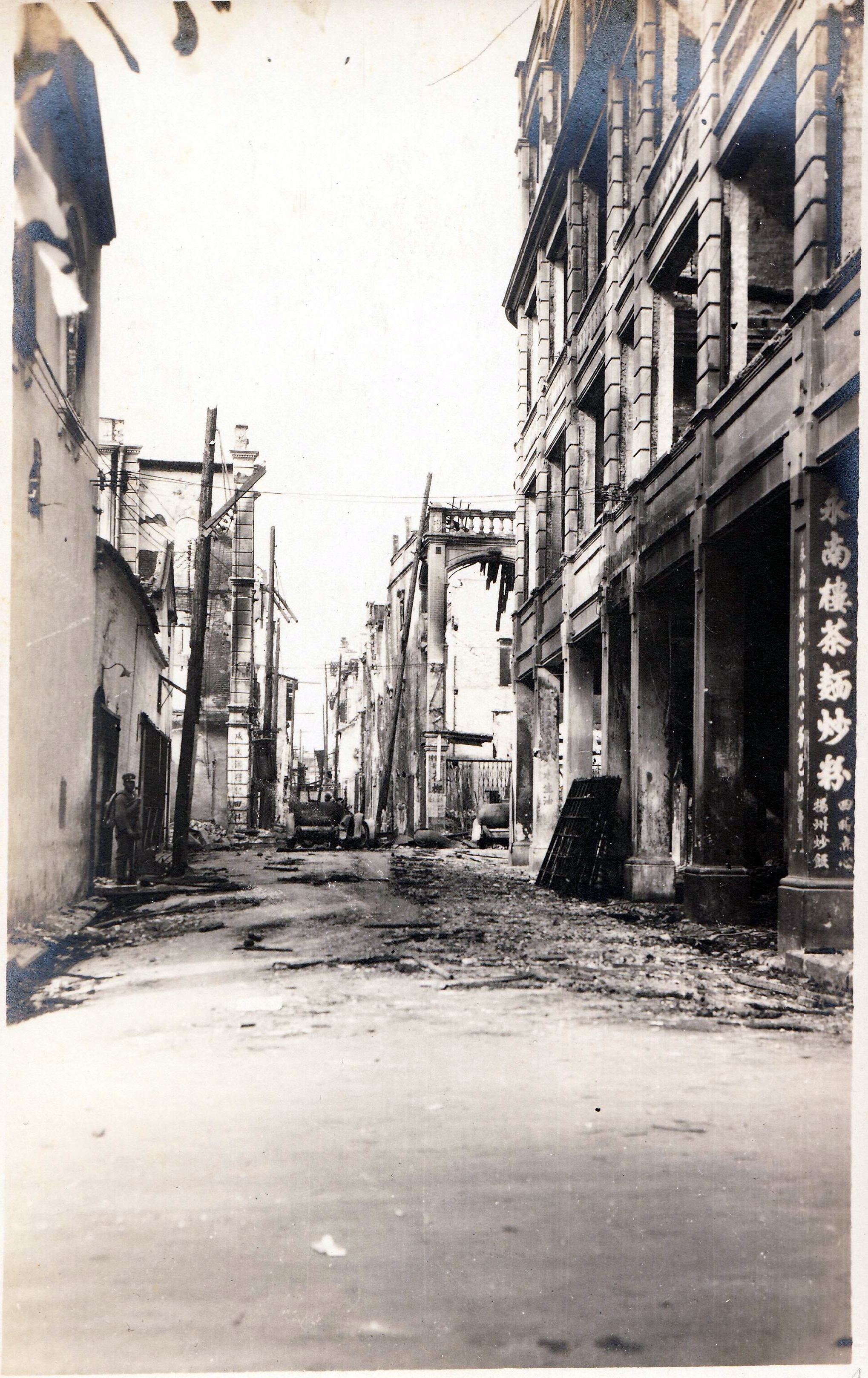 中華民國廣州市南堤太平通津路口永南樓（左方為太平沙中央銀行），騎樓底寫有茶麵、炒粉及揚州炒飯。